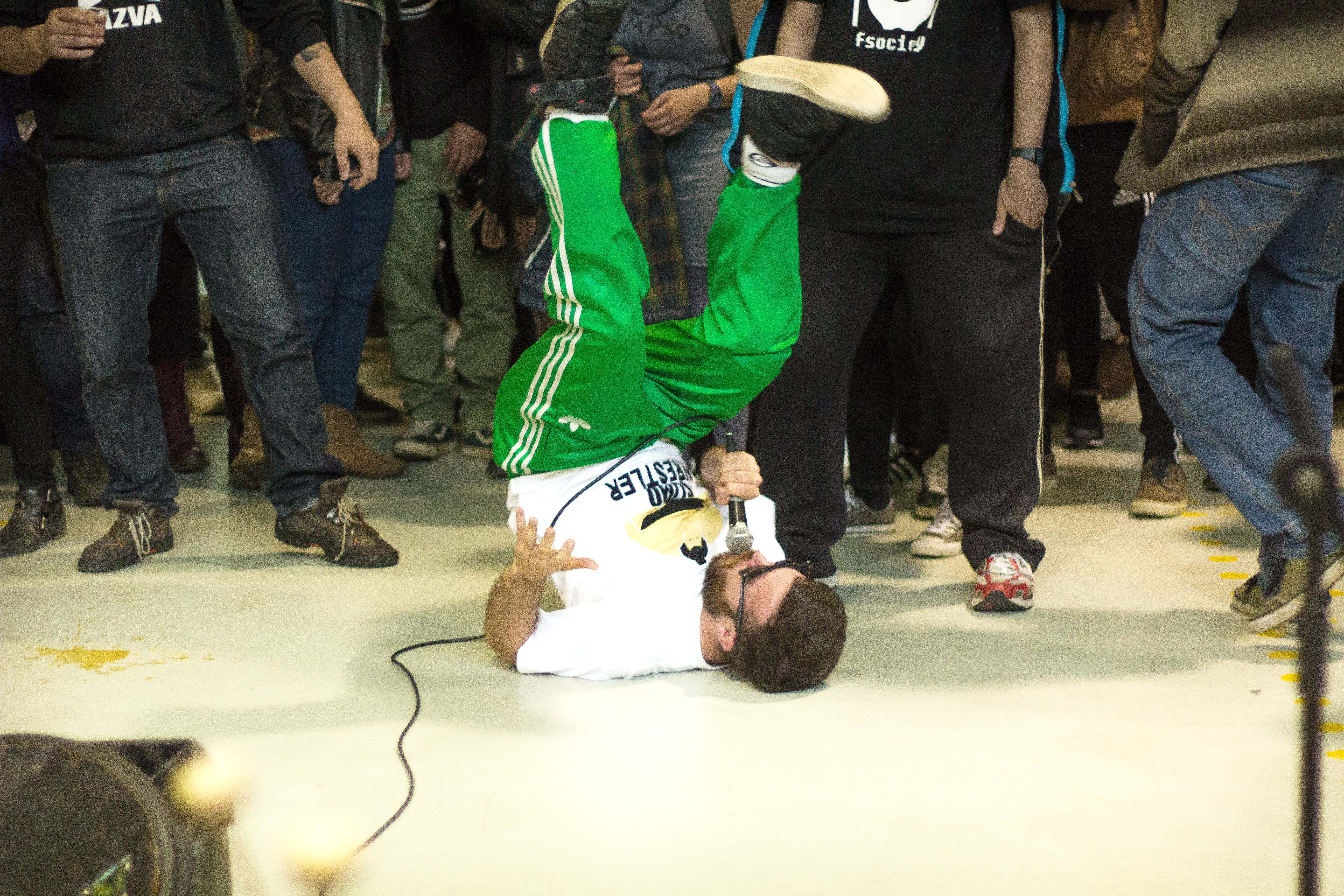 Hevi de Malandrómeda en directo en Lugo (2006).